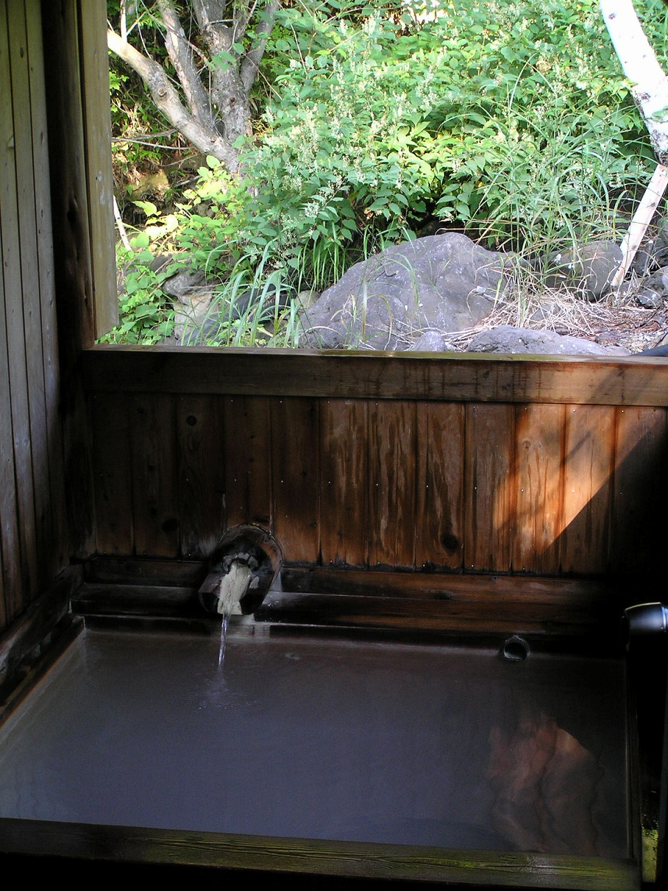 せせらぎの湯（無人）湯川温泉・乗鞍高原温泉